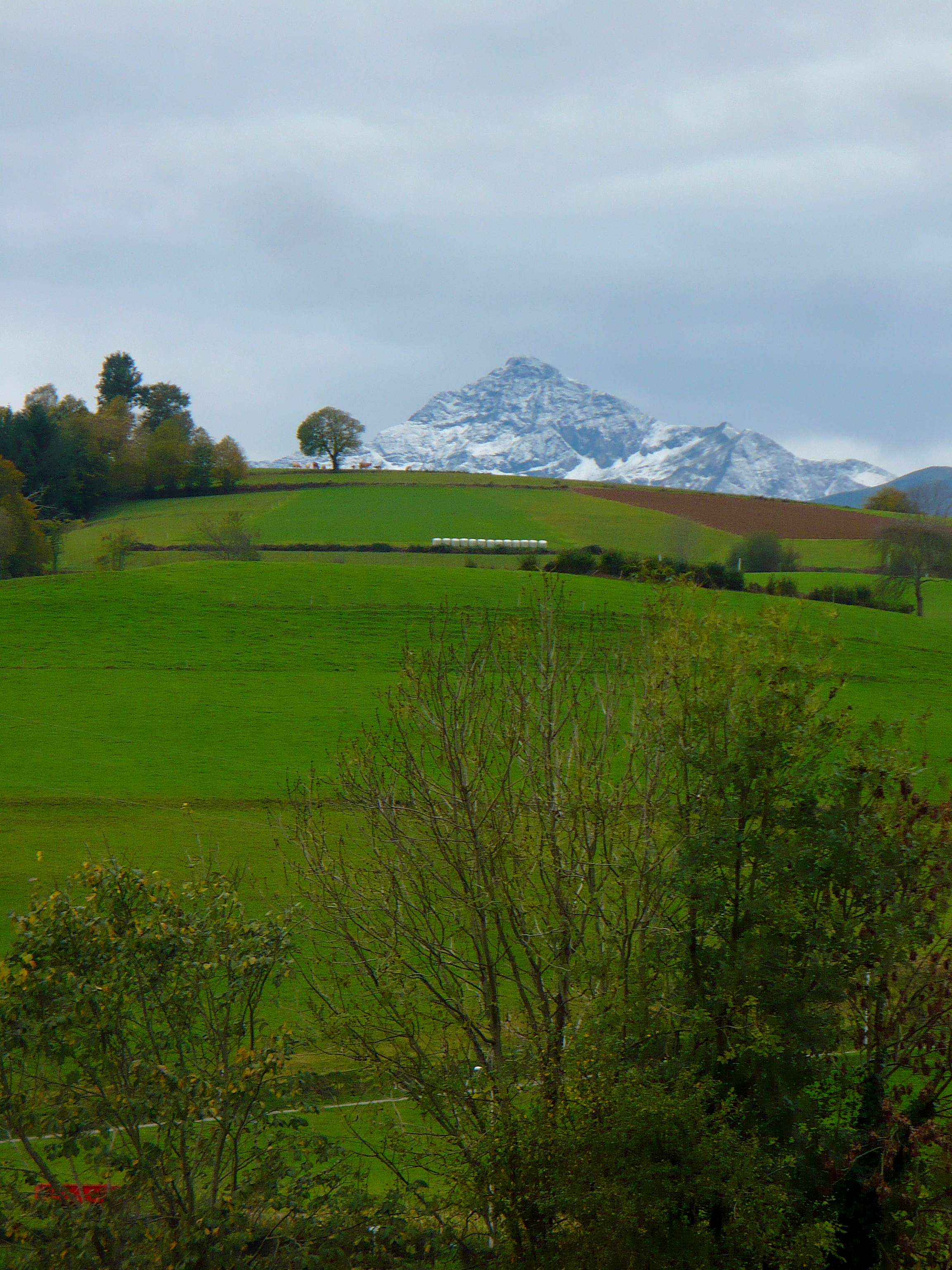 Paysage des Baronnies, commune de Bettes, France